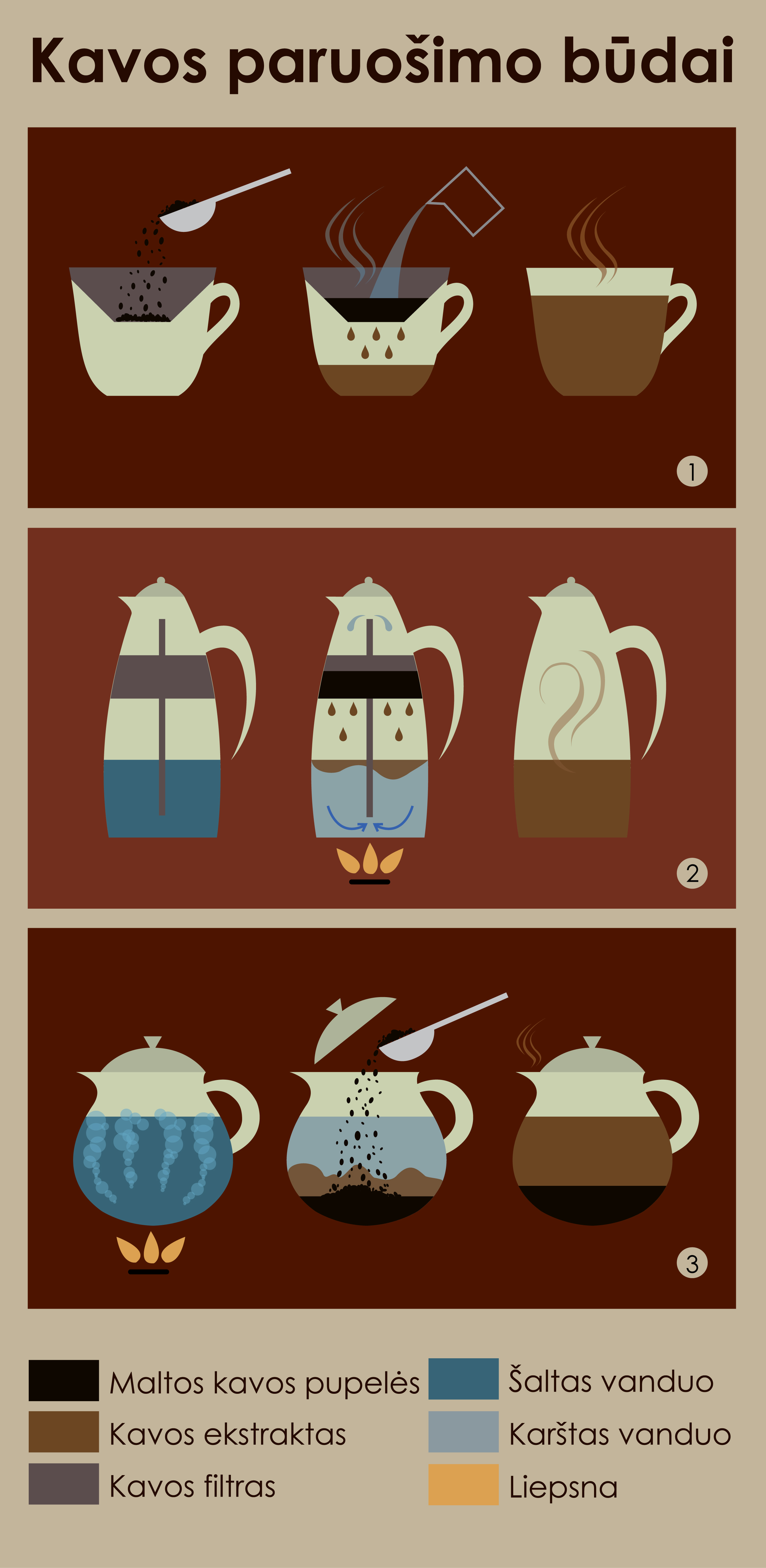 Kavos paruošimo būdai